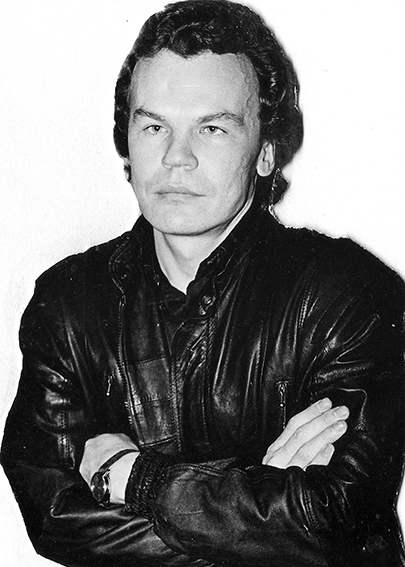 Юрий Александрович Беликов времён работы в пермской газете "Молодая гвардия", конец 1980-х.